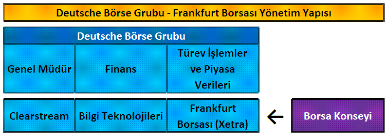 Deutsche Börse Grubu - Frankfurt Borsası Yönetim Yapısı